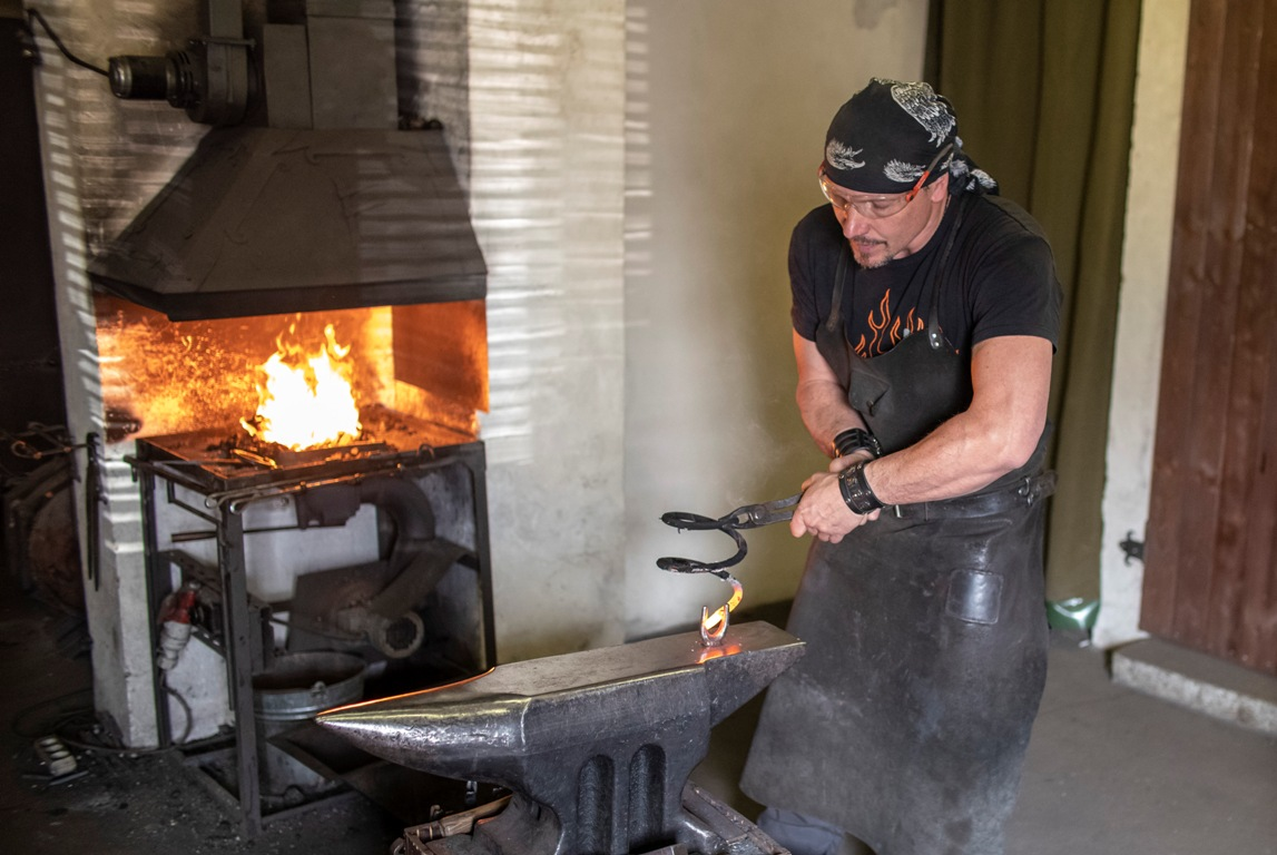 Práce na kovadlině, rovnání při 800°C